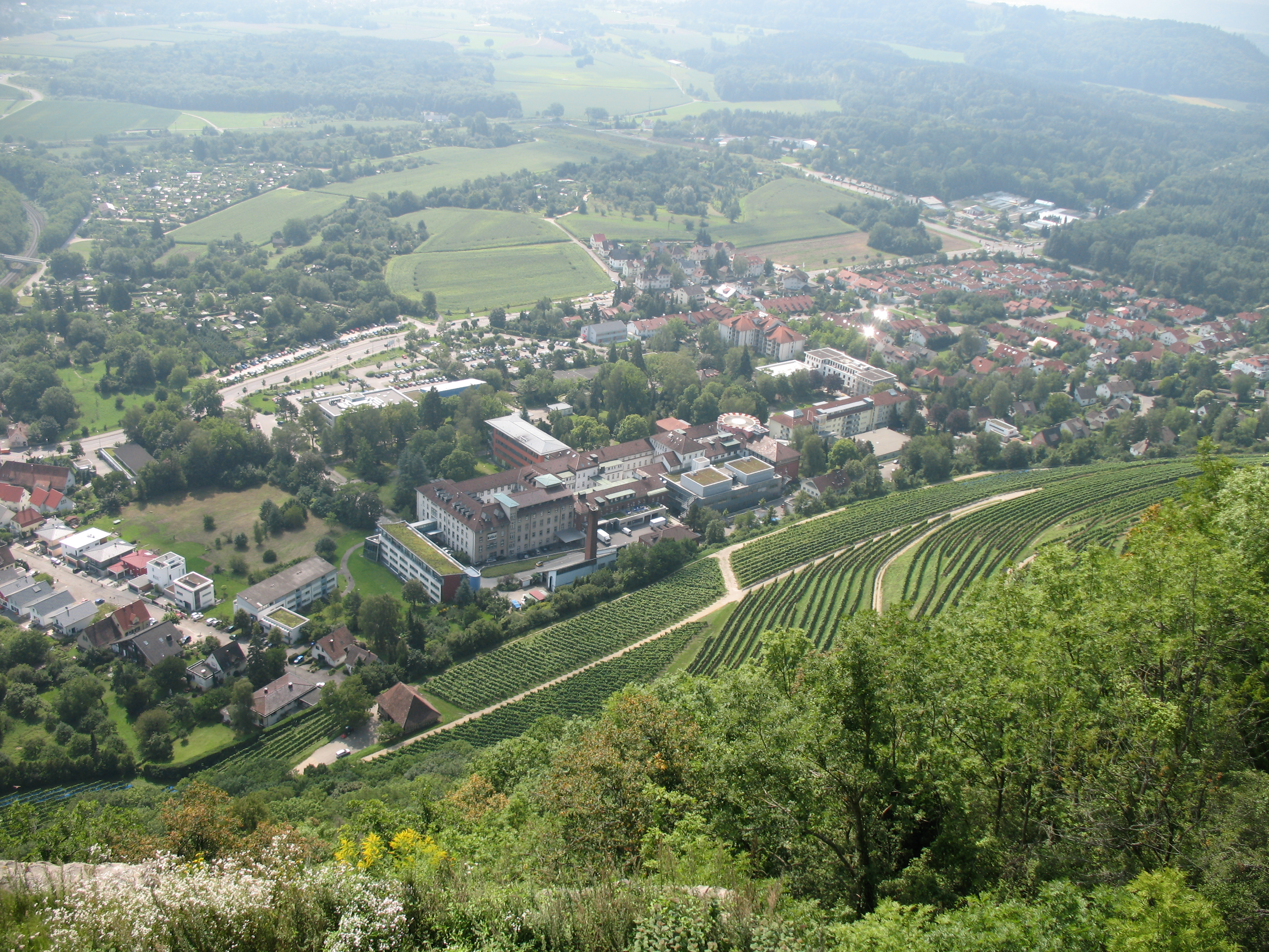 Blick hinab vom Hohentwiel auf die Ost-/ Südosthänge. Man erkennt das Weinanbaugebiet "Olgaberg" und das Hegau-Bodensee-Klinikum Singen.